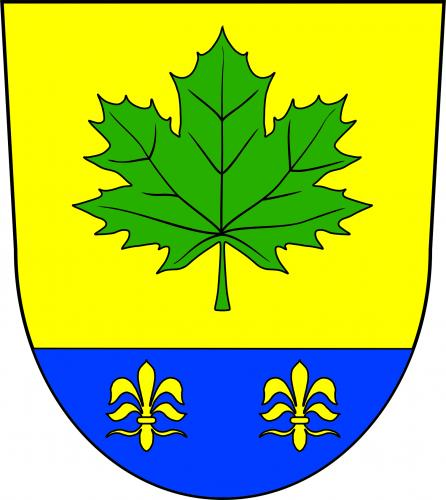 znak, Javorník, okres Ústí nad Orlicí